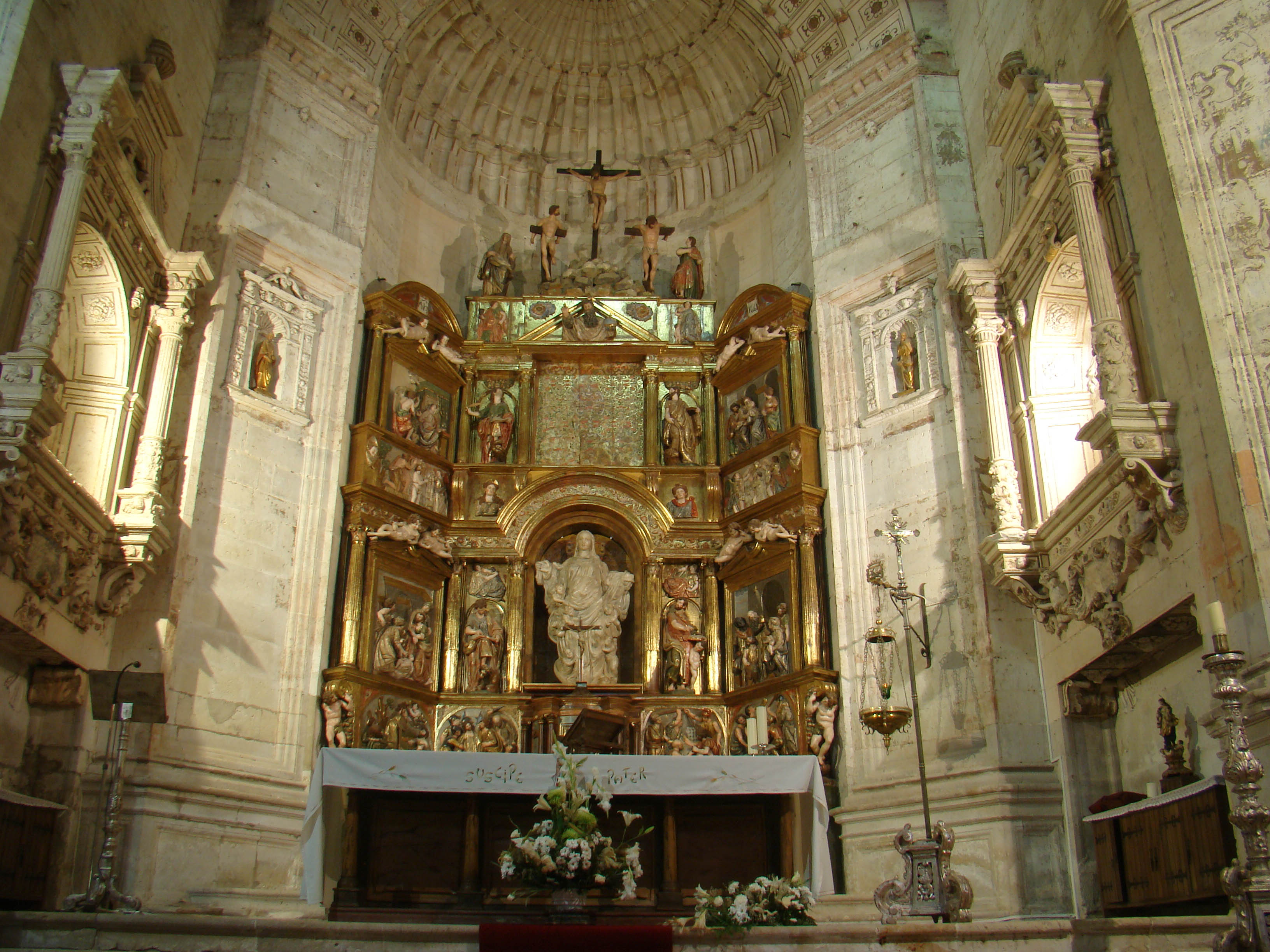 Monasterio cisterciense de la Santa Espina ubicado en la localidad menor llamada La Santa Espina del municipio de Castromonte en la provincia de Valladolid, España. Retablo mayor de madera policromada procede del monasterio de Retuerta en la provincia de Valladolid. Se construyó en el taller burgalés de Diego de Marquina en 1578.